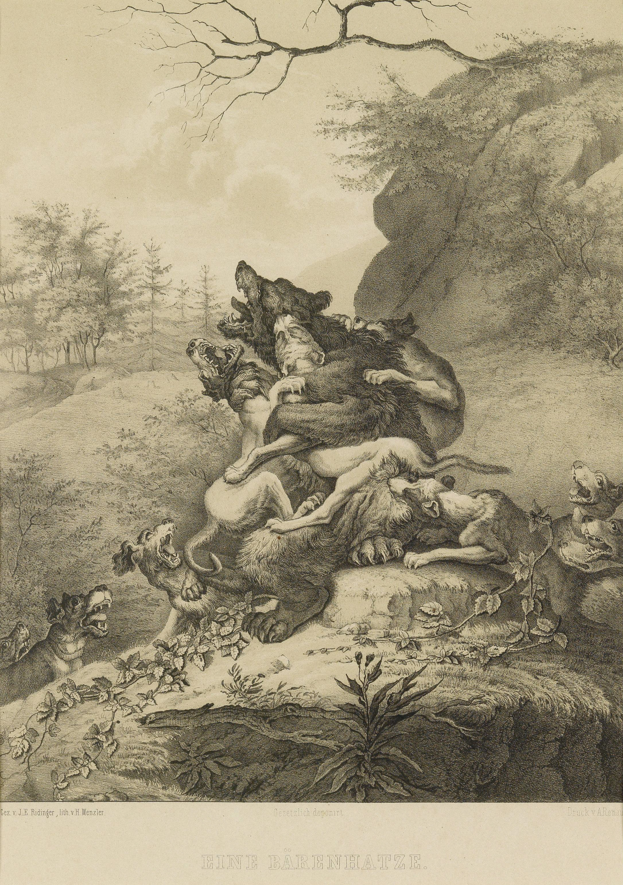 Eine Bärenhatze. Lithographie aus "Johann Elias Ridingers Jagd-Album" von Hermann Menzler im Druck von A. Renaud, verlegt bei L. J. Heymann in Berlin (1863-65), "Gez. v. J. E. Ridinger, lith. v. H. Menzler etc.", ca. 35 x 23 cm